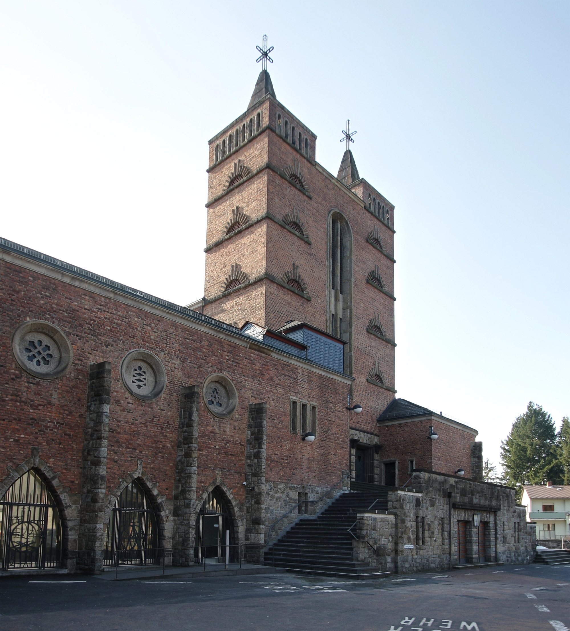 Pallottiner- und Pfarrkirche St. Marien, Limburg an der Lahn. Grundsteinlegung 18. Juli 1926, Weihe 2. Oktober 1927